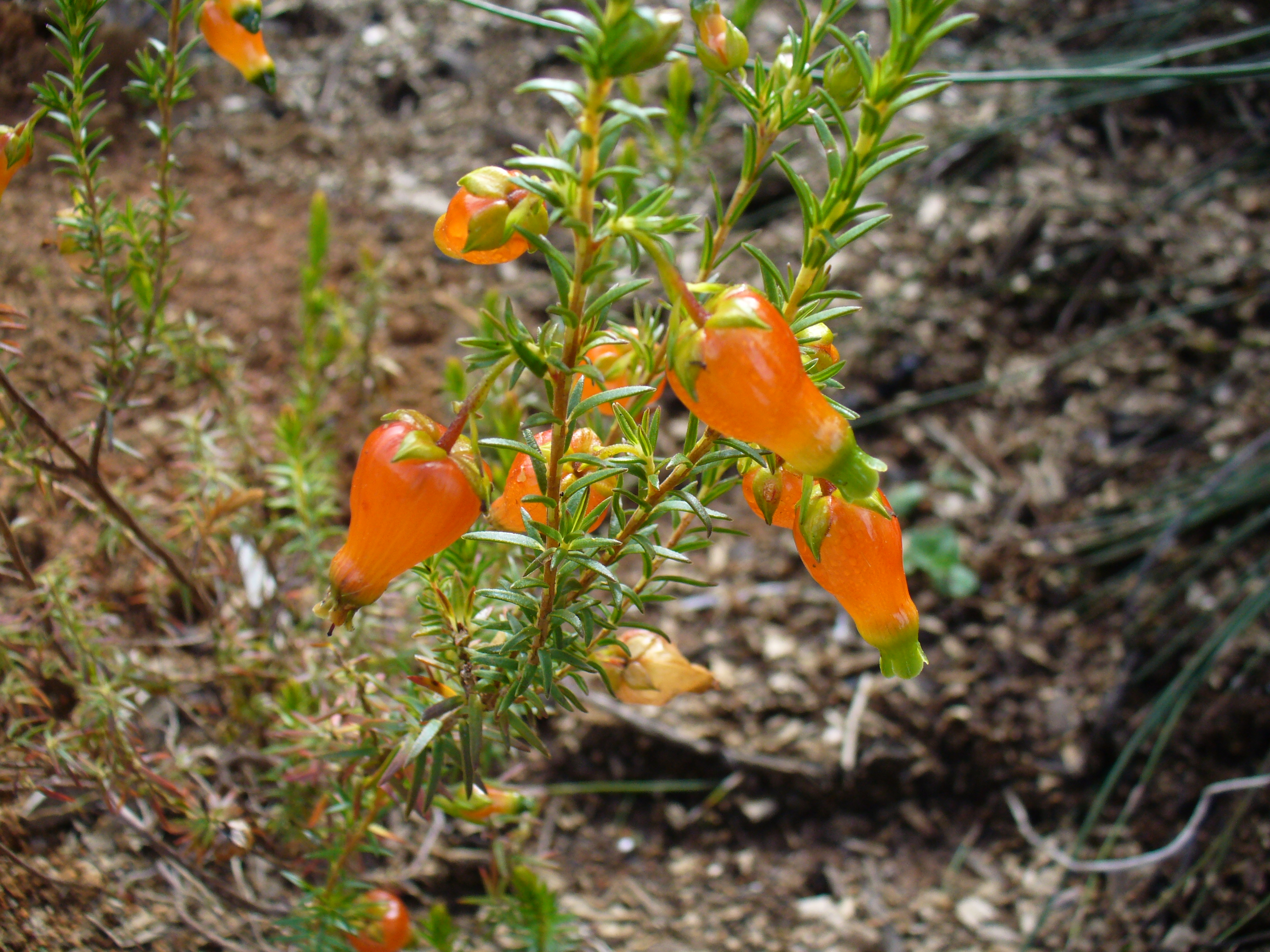 Kirstenbosch Gardens Cape Town